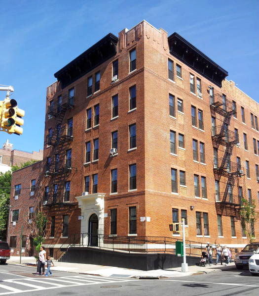 1522 Vyse Avenue - NY, 2016: home of Leon Trotsky in jan-mar 1917